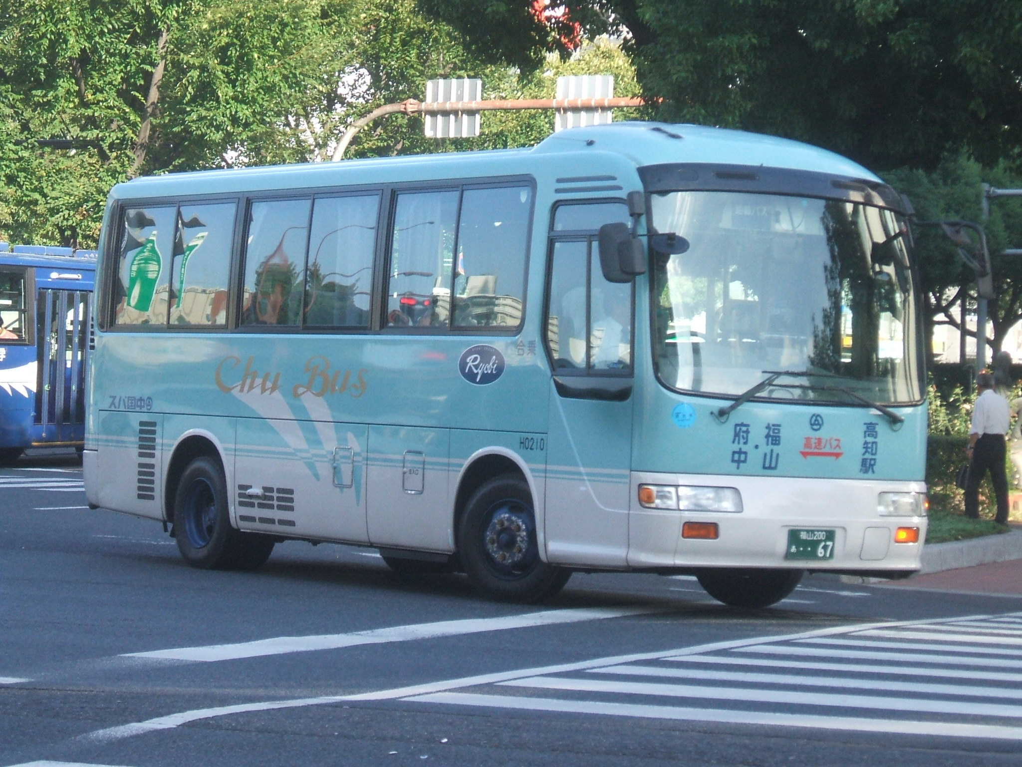 広島県福山市のバス会社である中国バスが運行する高速バス路線「オーシャンライナー」で運用されている日野リッセ。広島県福山市の福山郵便局前交差点で撮影。